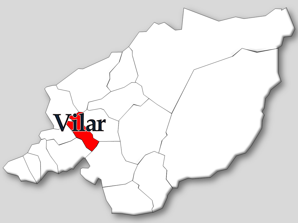 Censos 1864/2011